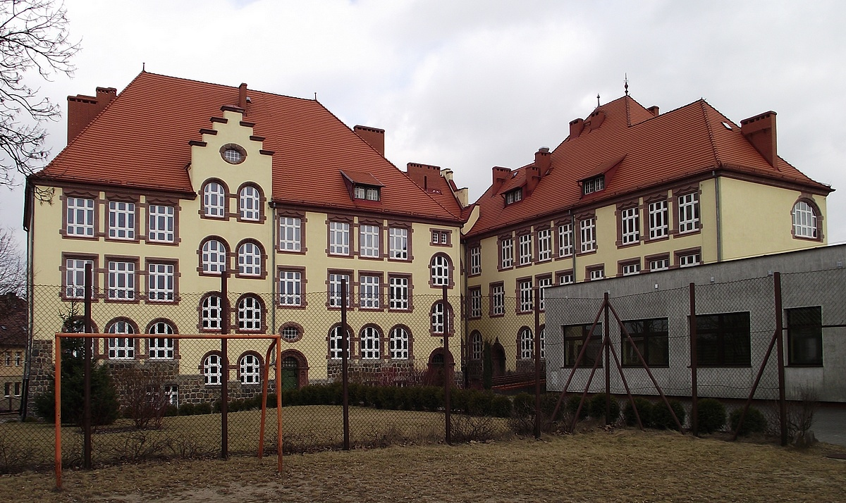 Wałcz, szkoła podstawowa nr 2, 1901-1905